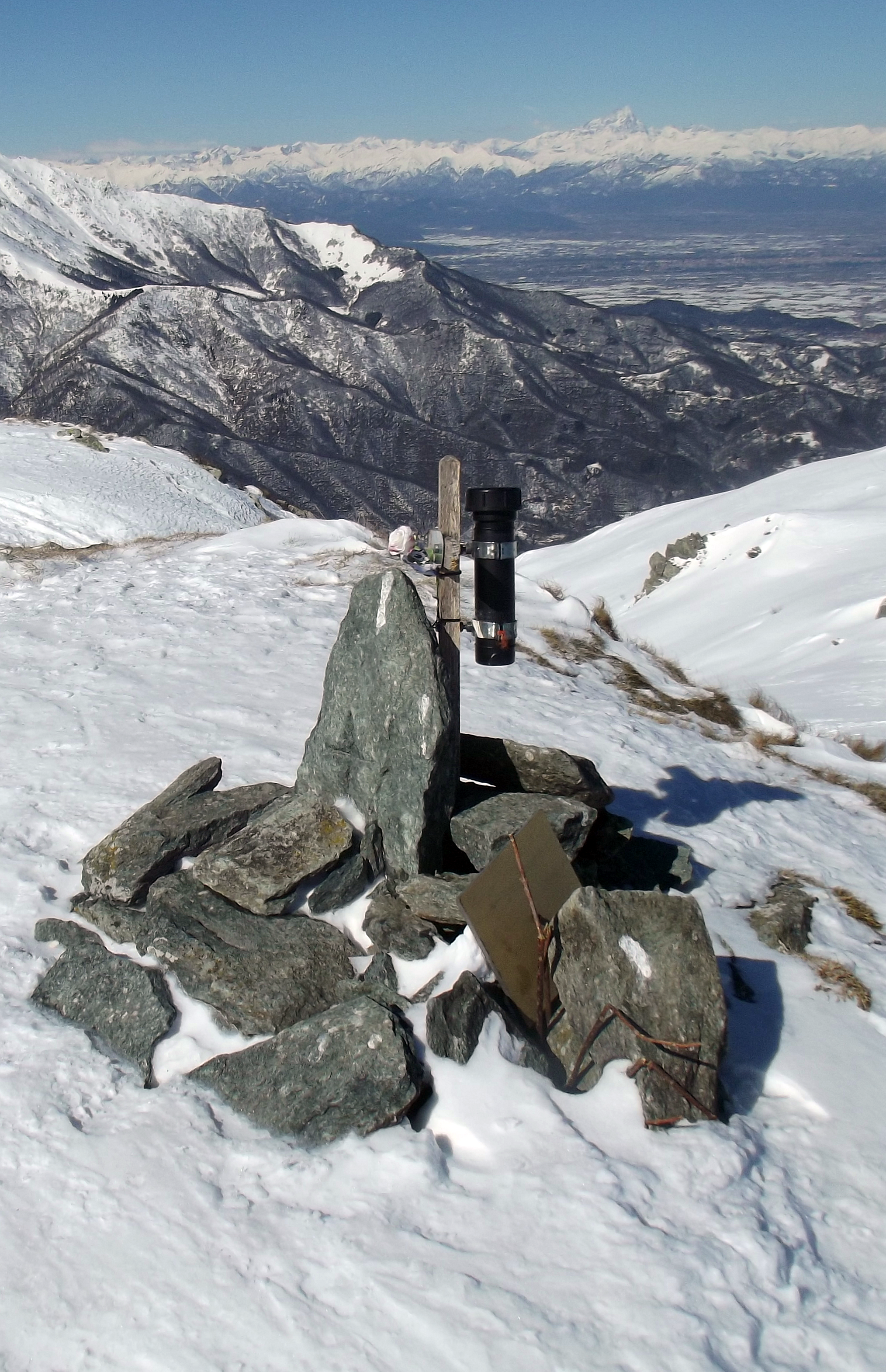 Il libro di vetta della Cima Gardiola, sullo sfondo il Monviso